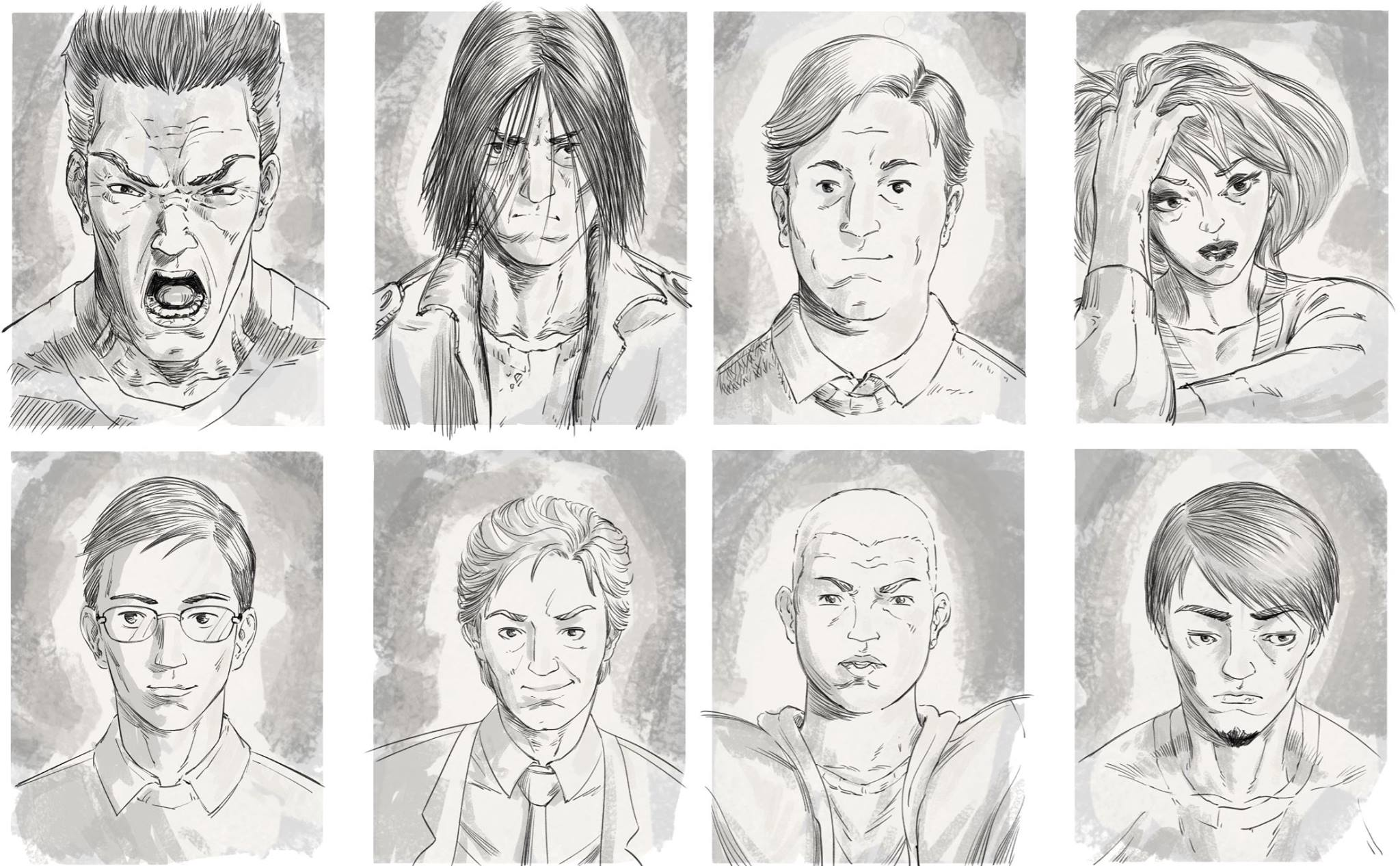 Процес створення головних героїв